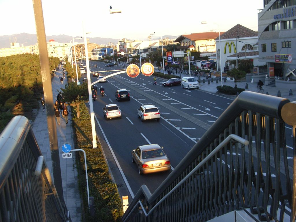 朝日に照らされる。